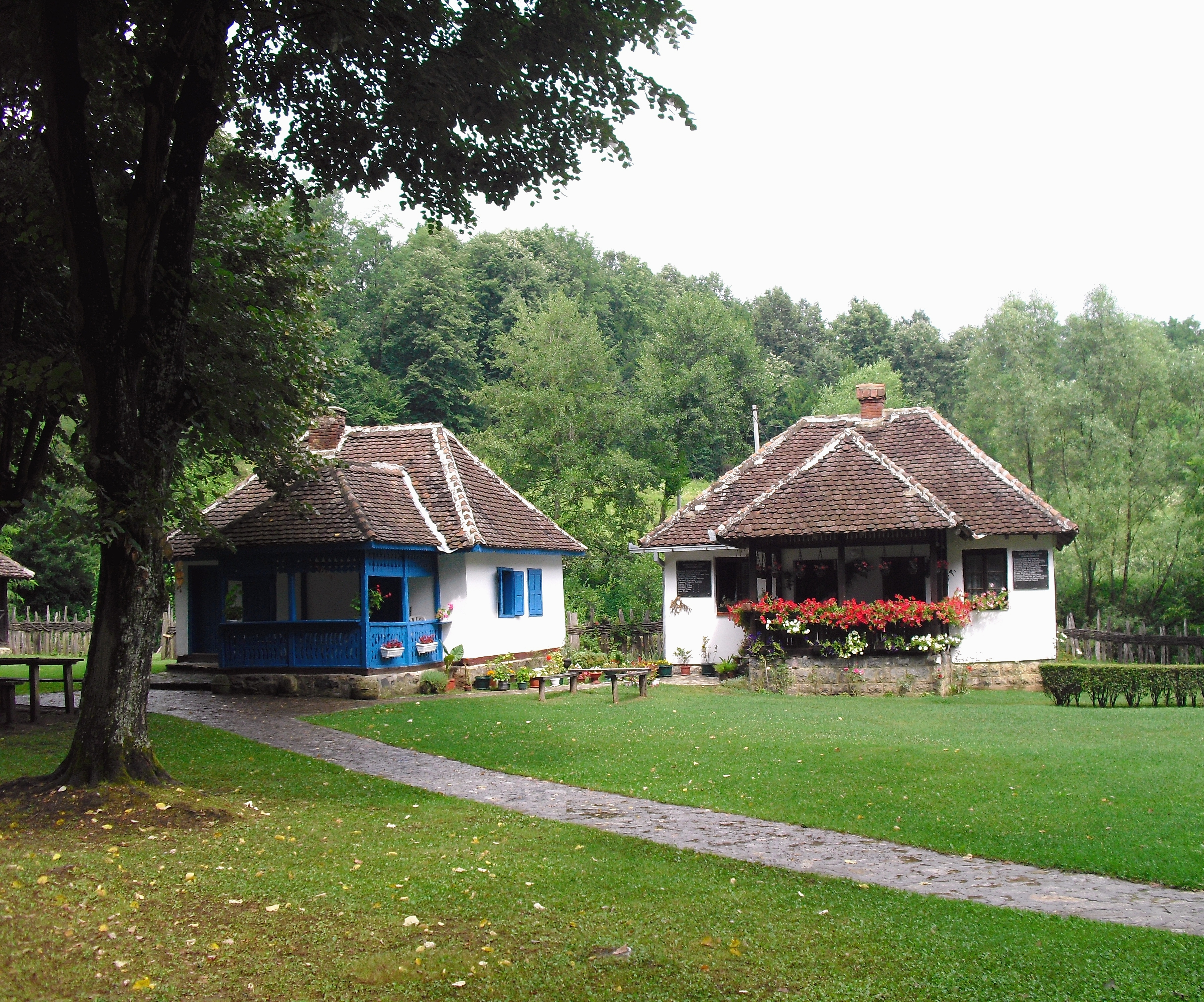 Меморијални комплекс у Бранковини...